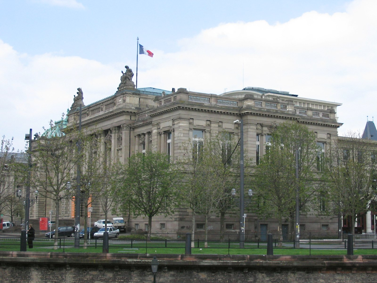 Théatre National de Strasbourg sur la place de la République à Strasbourg.